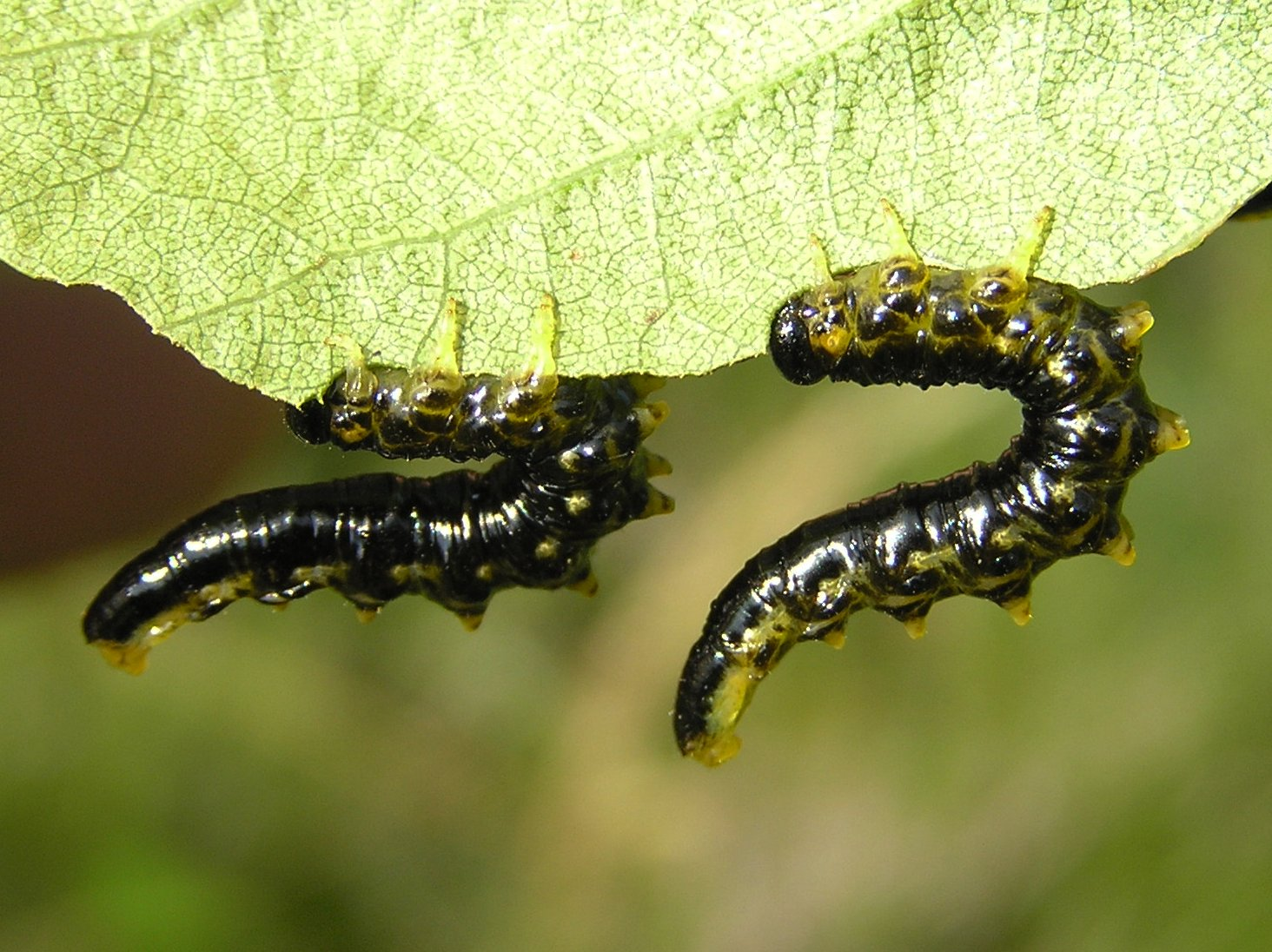 Craesus latipes, Syn Croesus_latipes Vill., Brok, Polska